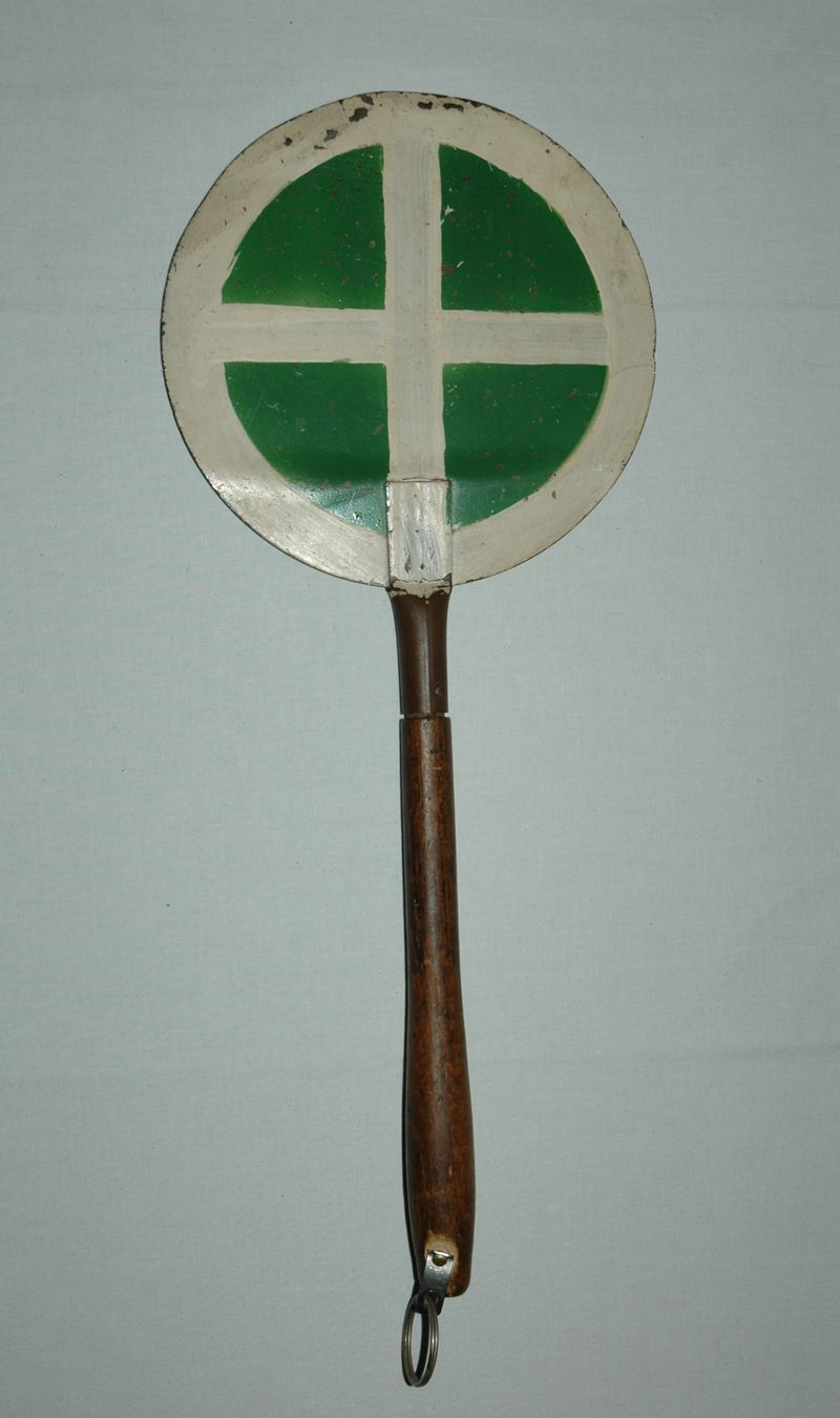 výpravka - from Czech station Josefova jáma